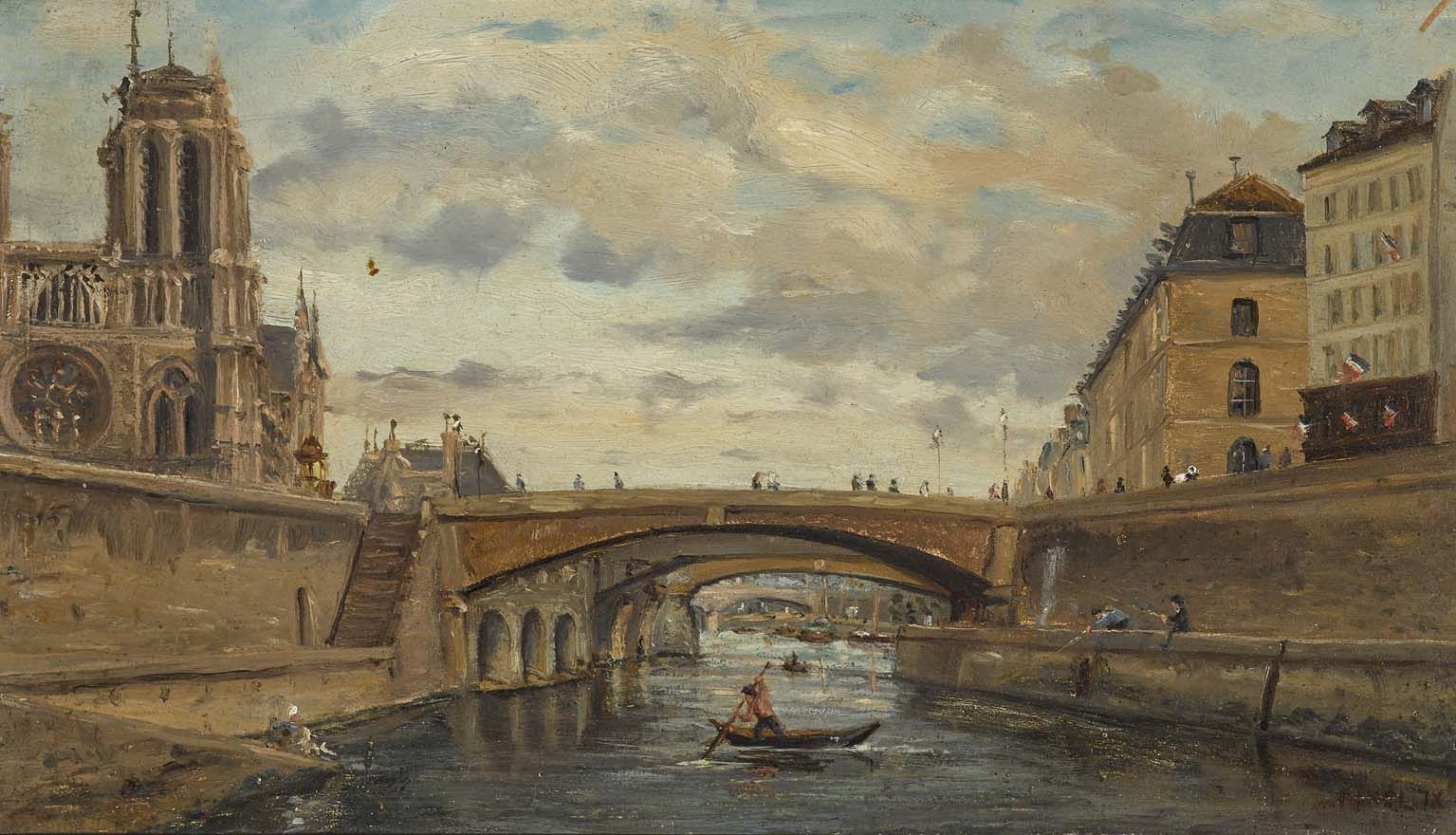 Paris; Öl auf Holz. 15,5 x 27 cm.